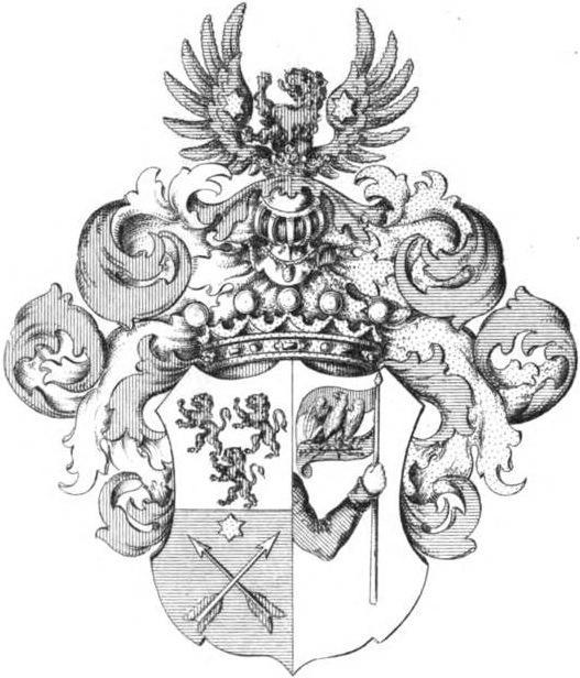 Wappen Pirquet von Cesenatico - Tyroff AT.jpg